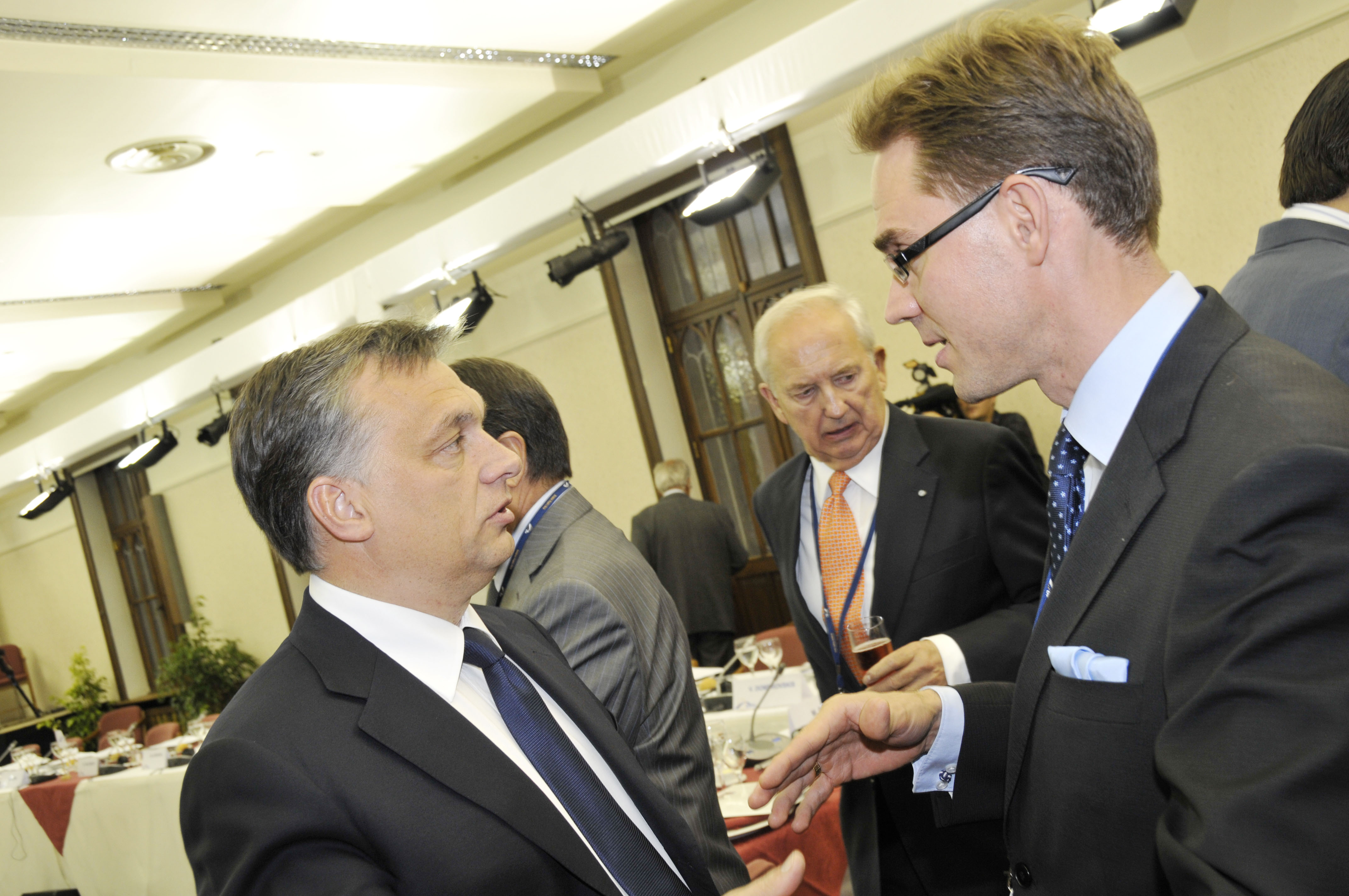 EPP Summit September 2010